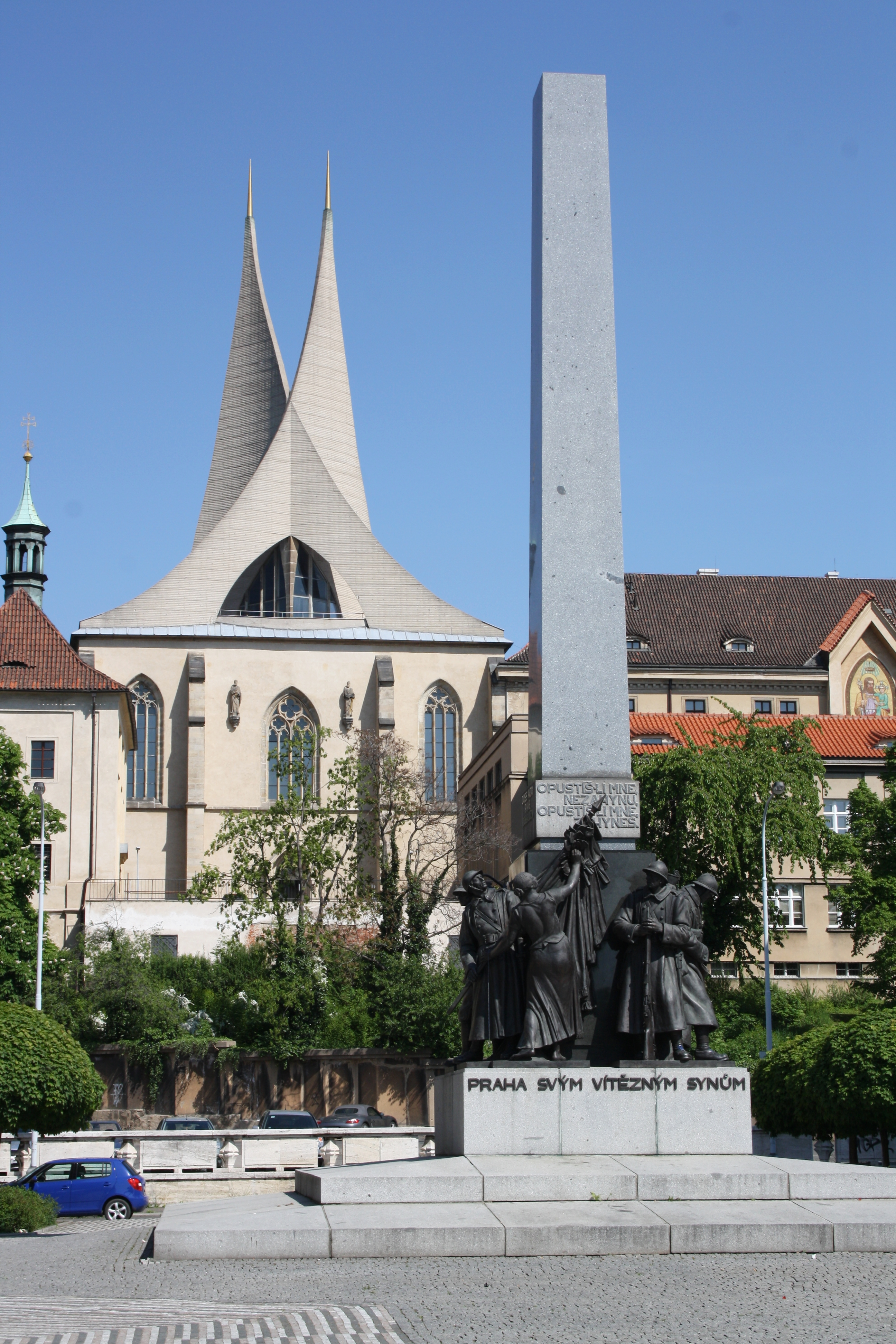 Pomník Praha svým vítězným synům na náměstí Pod Emauzy